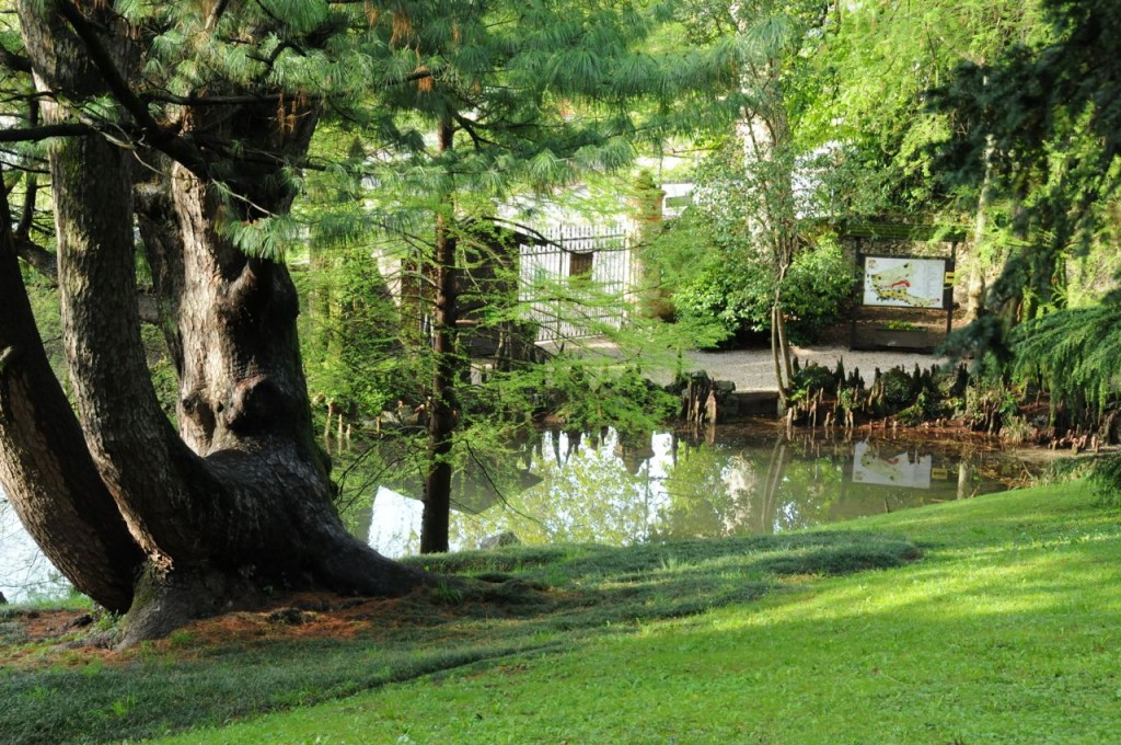 Santorso, Parco storico, immagine del laghetto con cedro himalaiano